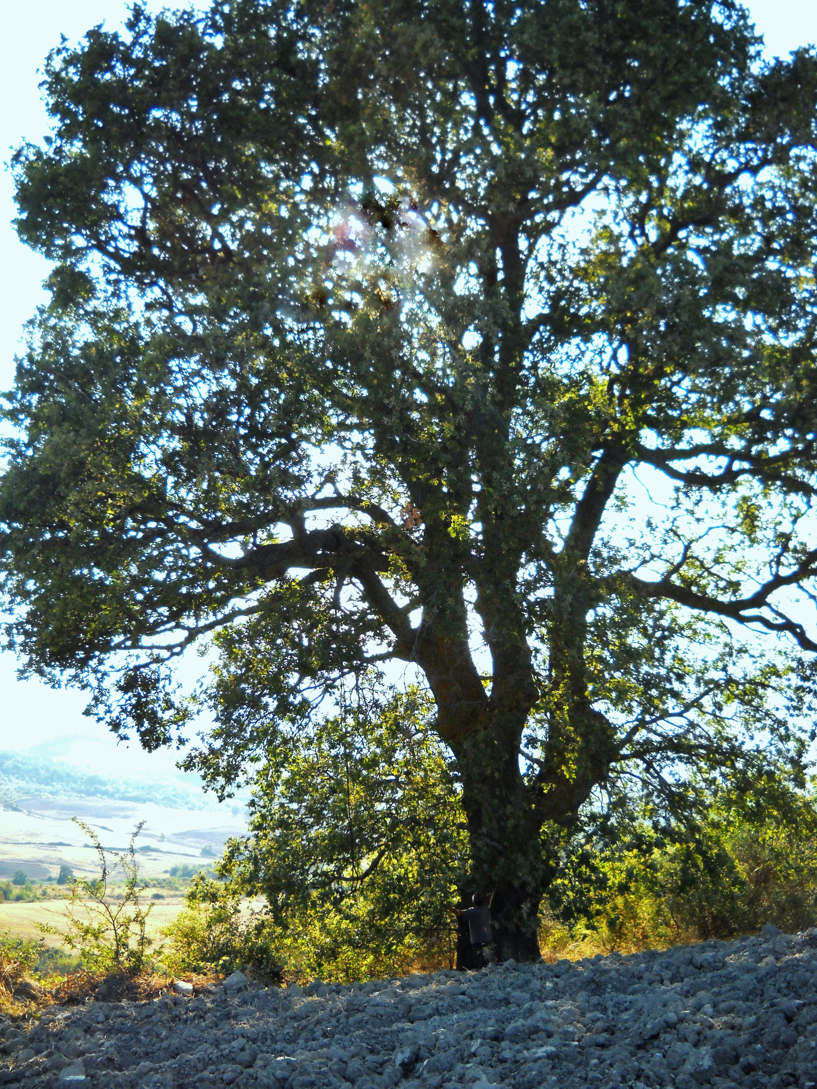 roverella monumentale in agro di Petrella Tifernina fotografata nell'agosto 2017 This is a photo of a monument which is part of cultural heritage of Italy.